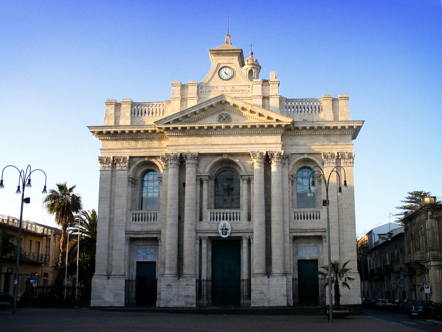 Facciata della Basilica di San Pietro vista dalla piazza di Riposto.